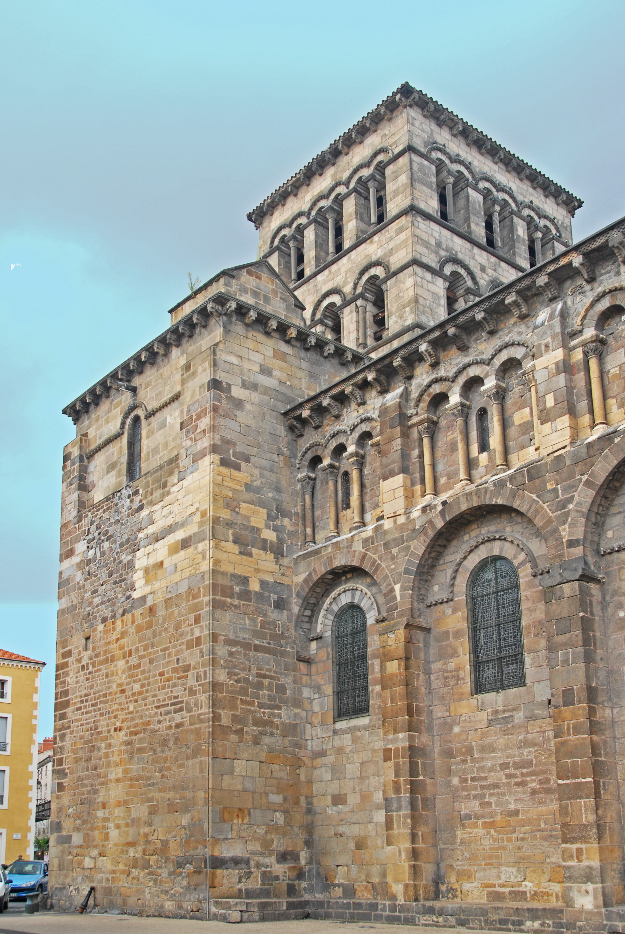 Werstwerk von SO